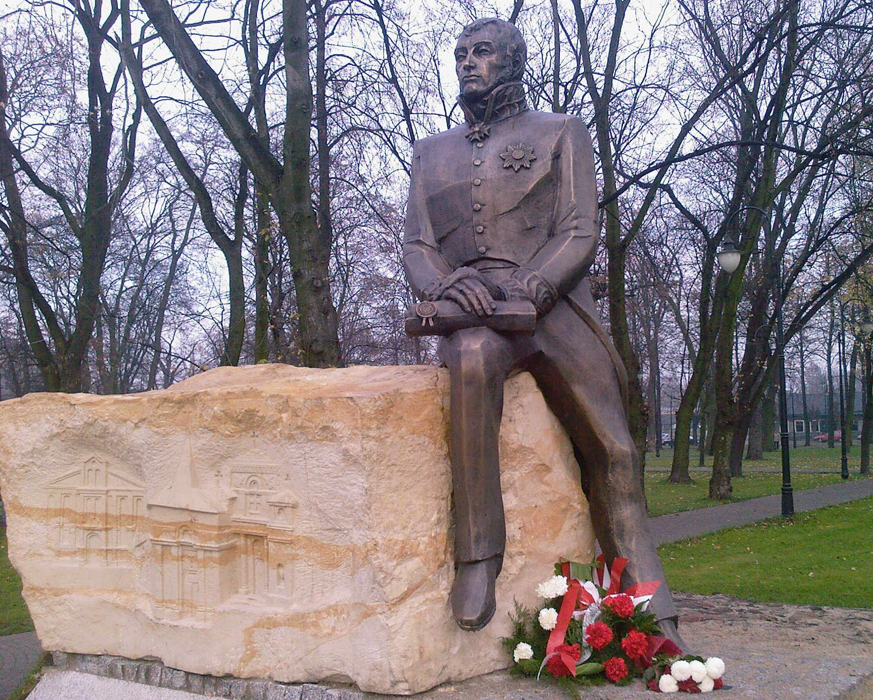 Nowy pomnik Rafała Bratoszewskiego - założyciela miasta Aleksandrowa Łódzkiego